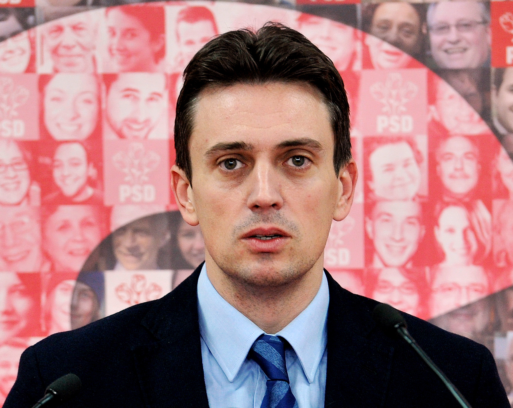 Conferinta Catalin Ivan la sediul PSD - 05.12.2013